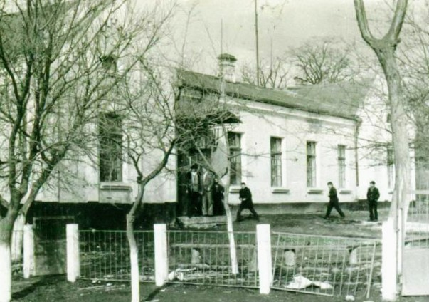 Приміщення старої школи. Зараз його вже немає.